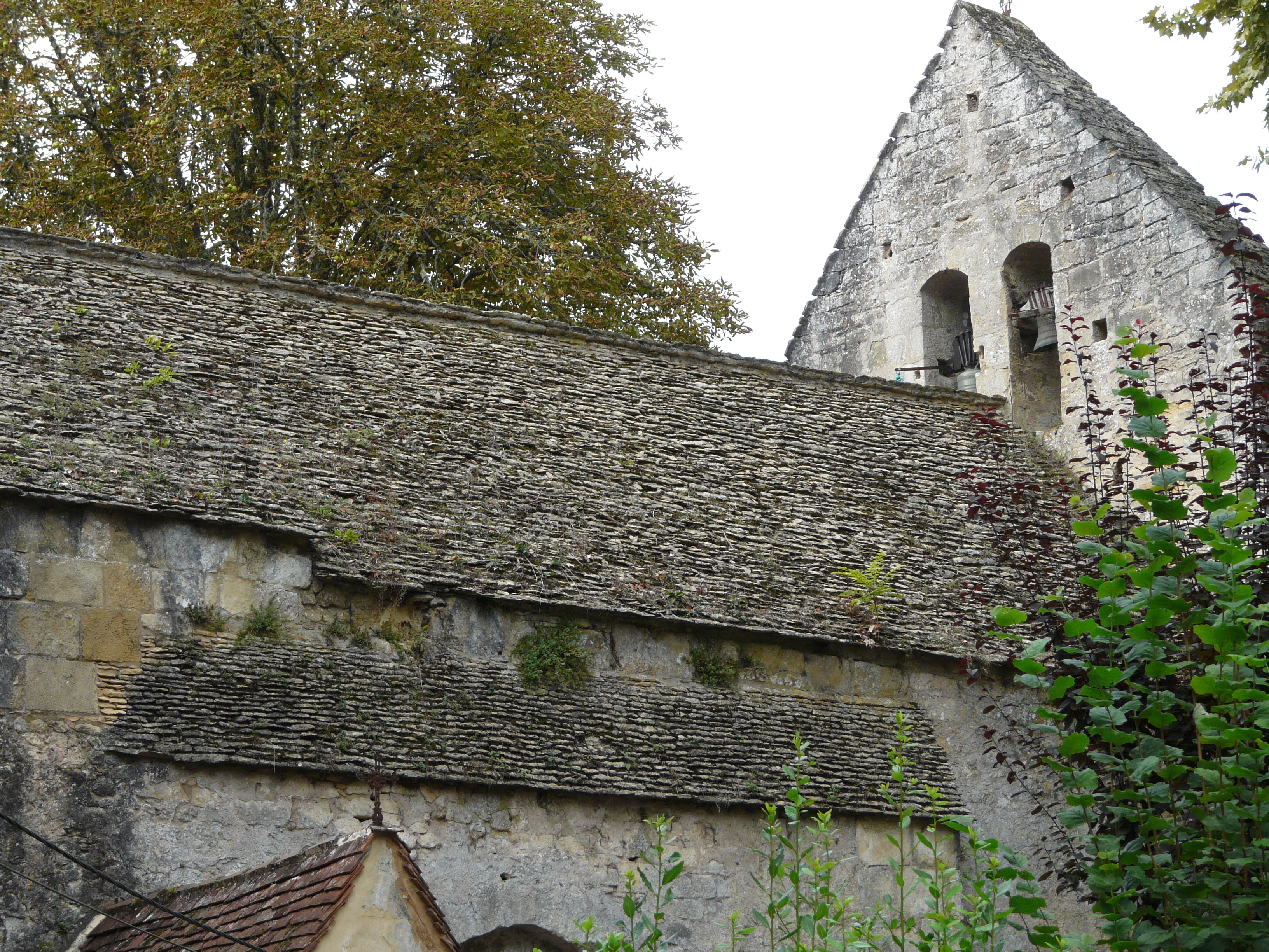 Toits en lauzes de l'église Saint-Robert du Moustier, Peyzac-le-Moustier, Dordogne, France. .